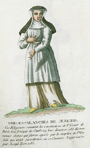 Collection de costumes de tous les ordres monastiques, supprimés à differentes époques, dans la ci-devant Belgique, Bruxelles, Philippe Joseph Maillart et sœur, 1811